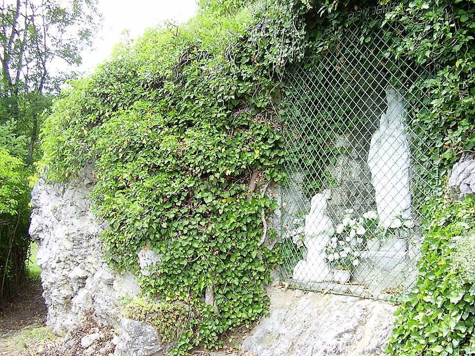 Dédestapolcsányban a Serényi István-emlékkeresztet fölött található a sziklába vájt Lourdes-i Mária-barlang.